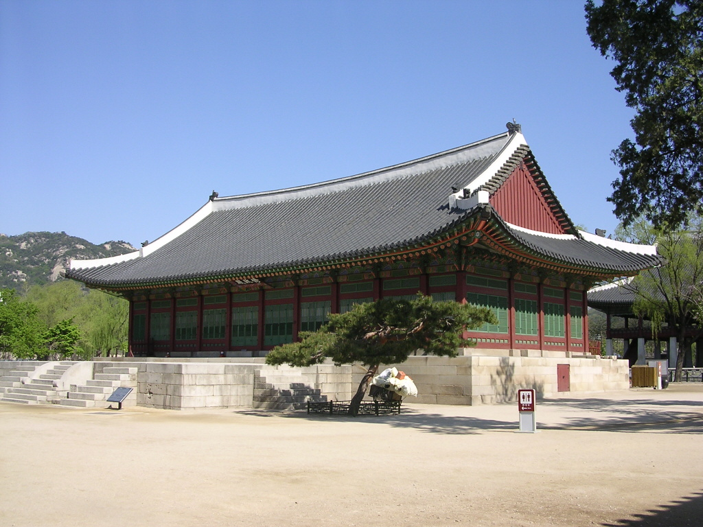 경복궁 수정전(景福宮 修政殿), 대한민국의 보물 제1760호